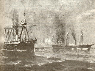 Captura de la corbeta Pilcomayo por el blindado Blanco Encalada